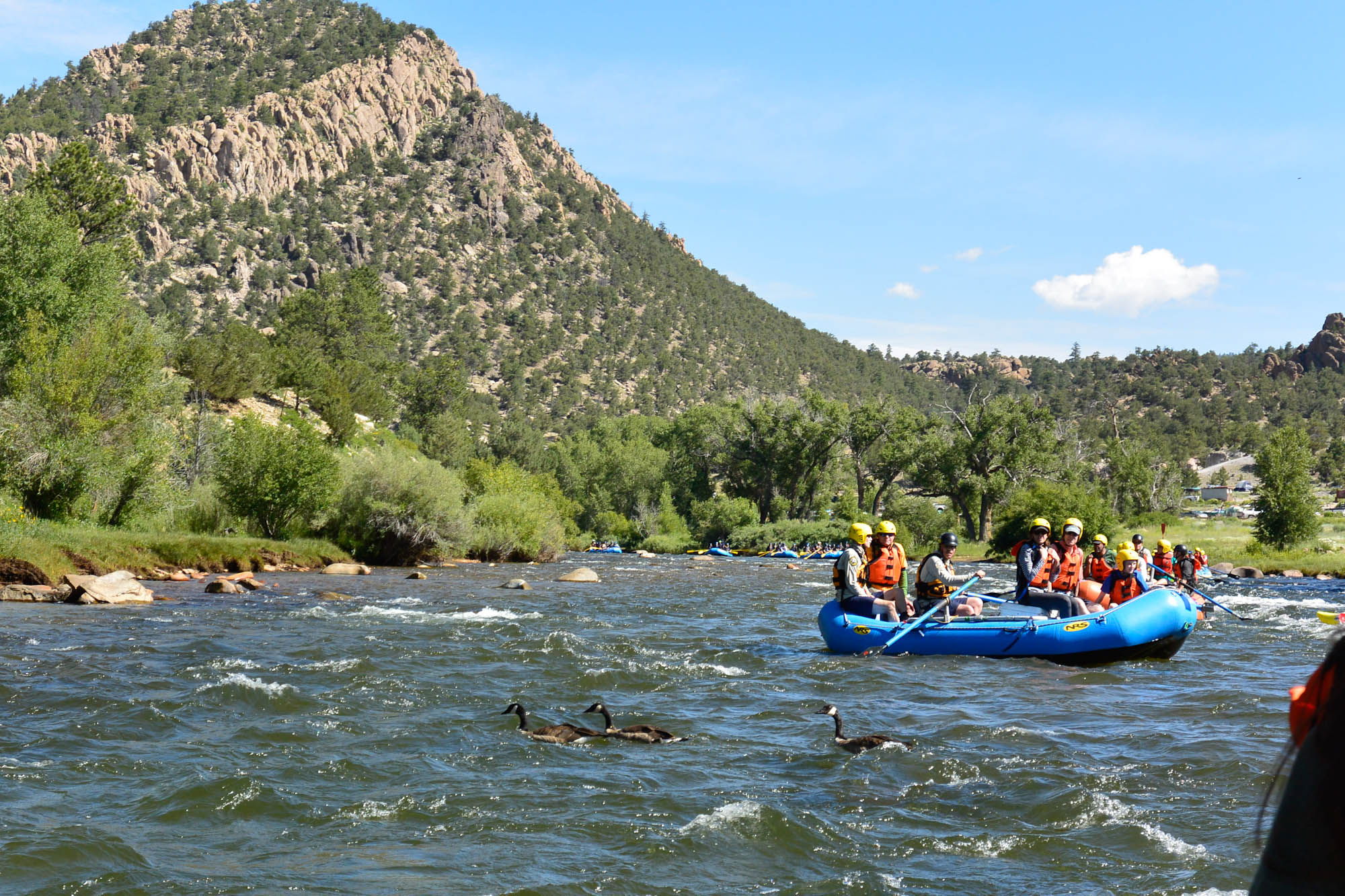 _DSC0156a